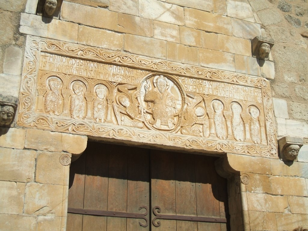 Abbaye de Saint-Génis-des-Fontaines (Pyrénées-Orientales, Languedoc-Roussillon, France) : façade de l'église abbatiale Saint-Génis (Xème - XIIème siècles) : le linteau (1019-1020) et les corbeaux sculptés qui soutenaient un auvent le protégeant.